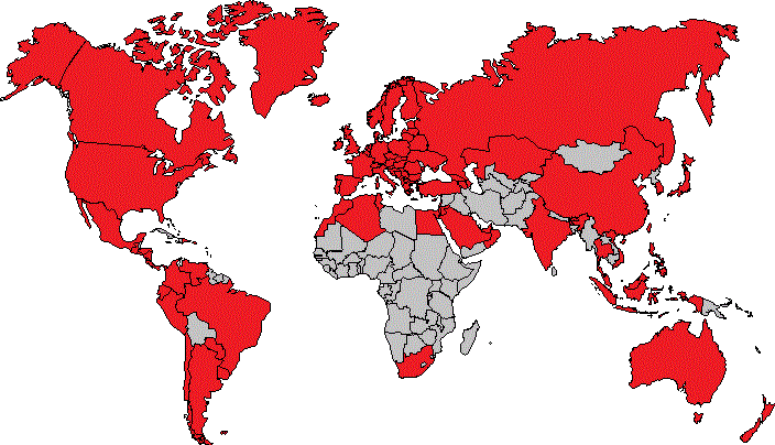 Mapa de Inditex en 2017